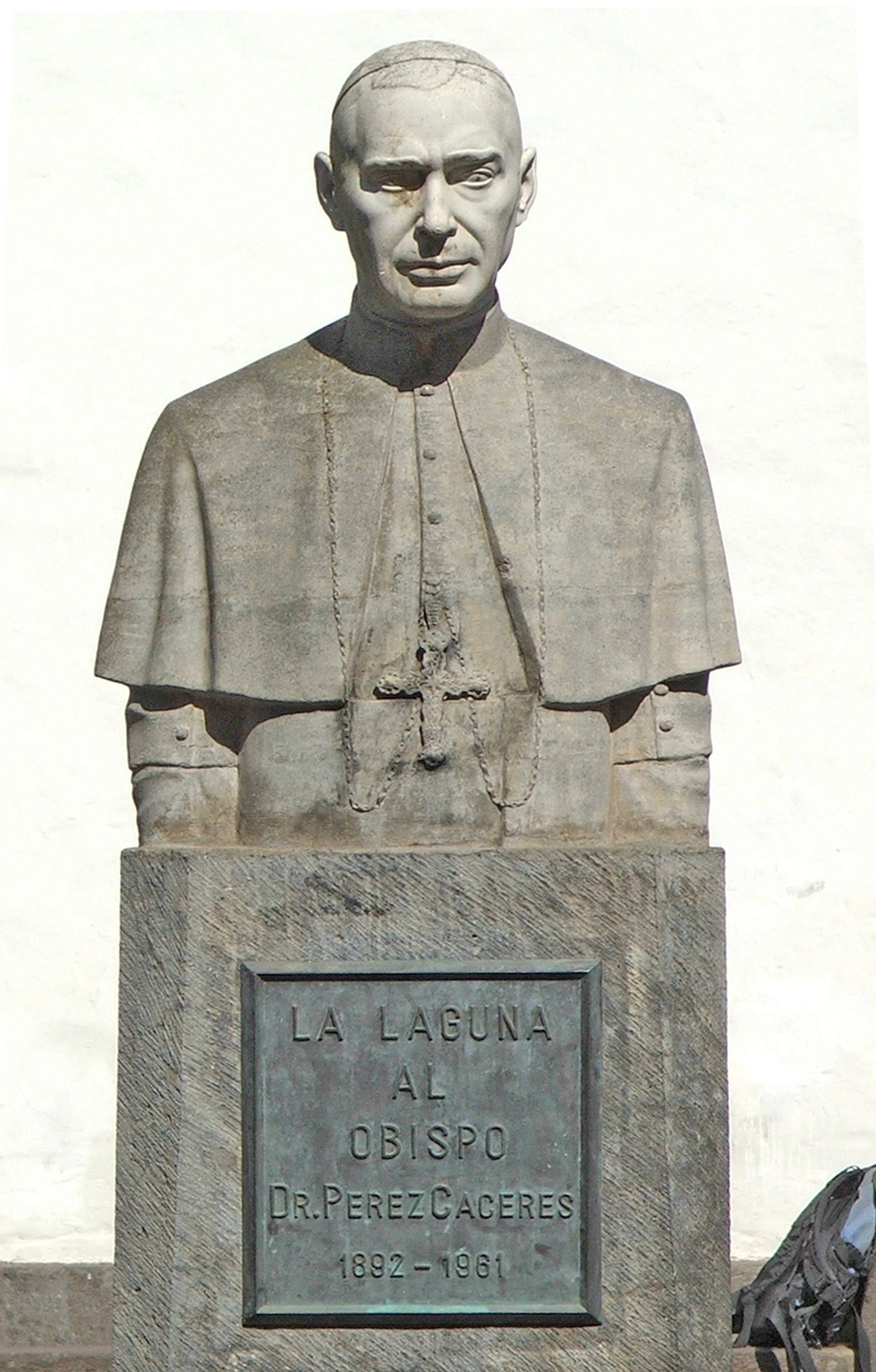 Don Domingo Pérez Cáceres Obispo de San Cristóbal de La Laguna en la Plaza de la Catedral La Laguna